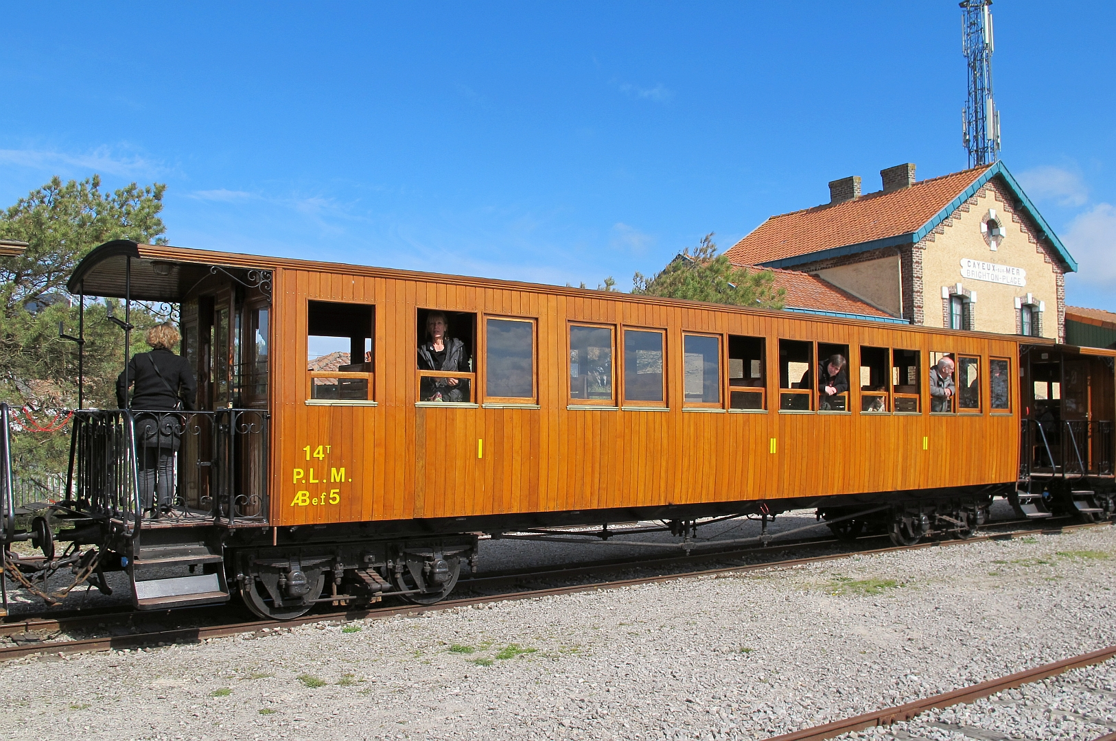 La voiture PLM ABef 5 en gare de Cayeux, sur le chemin de fer de la baie de Somme le 28 avril 2013.